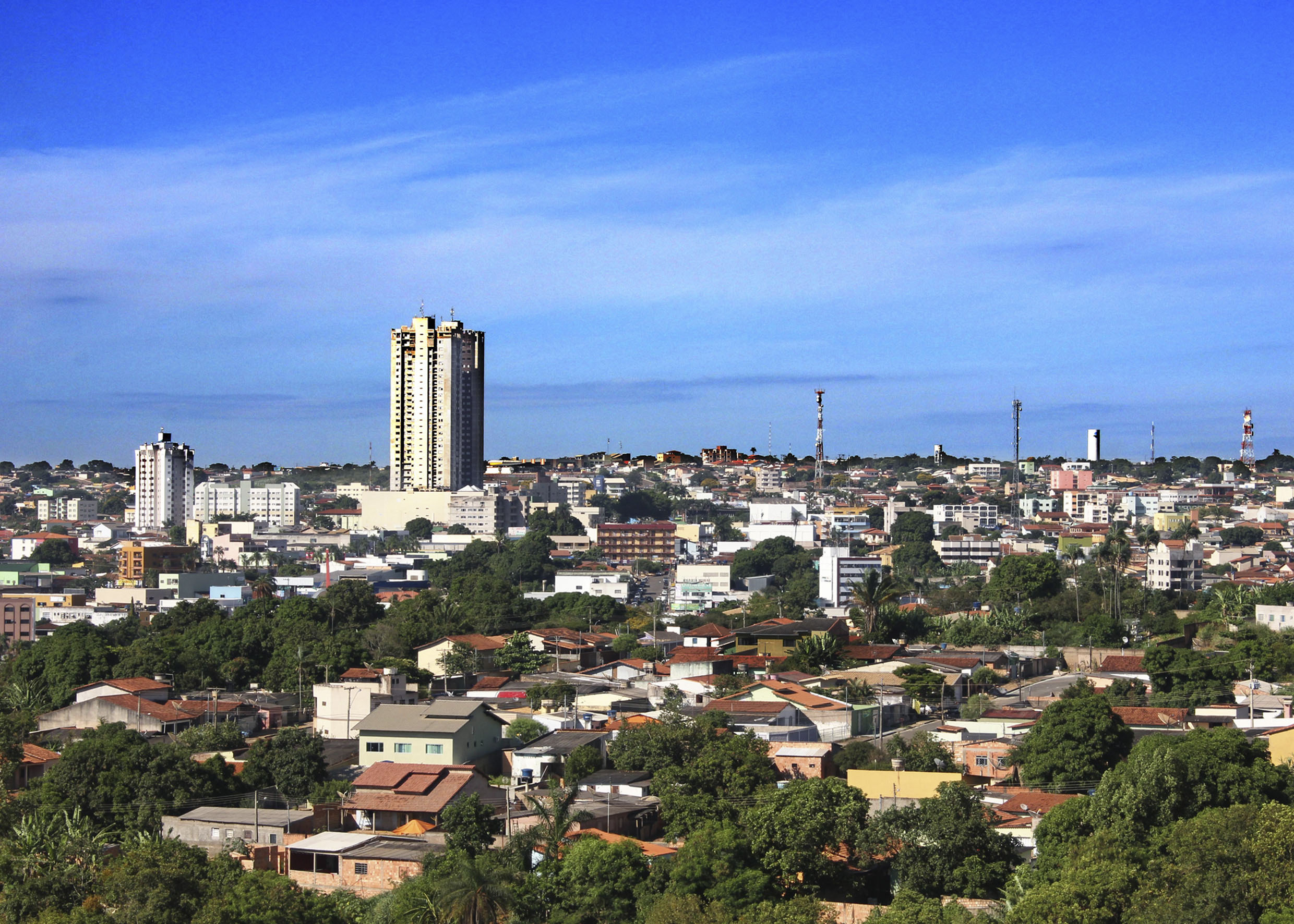 Foto panorâmica de Luziânia Goiás